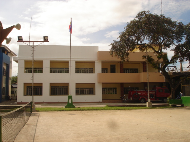 Oas, Albay, Philippines